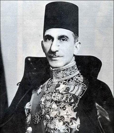 أحمد حسنين باشا رئيس الديوان الملكي في عهد الملك فاروق